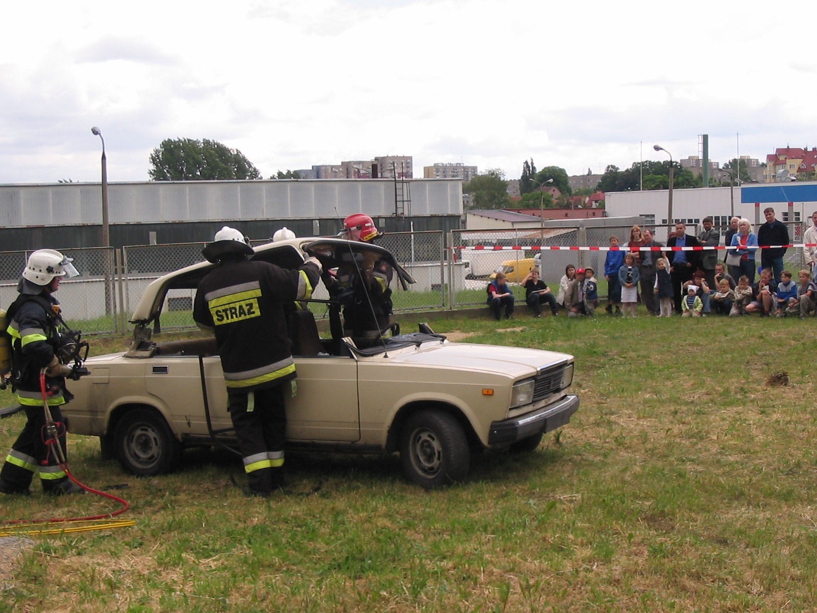 Pokazowe ćwiczenia straży pożarnej Autor:Mohylek